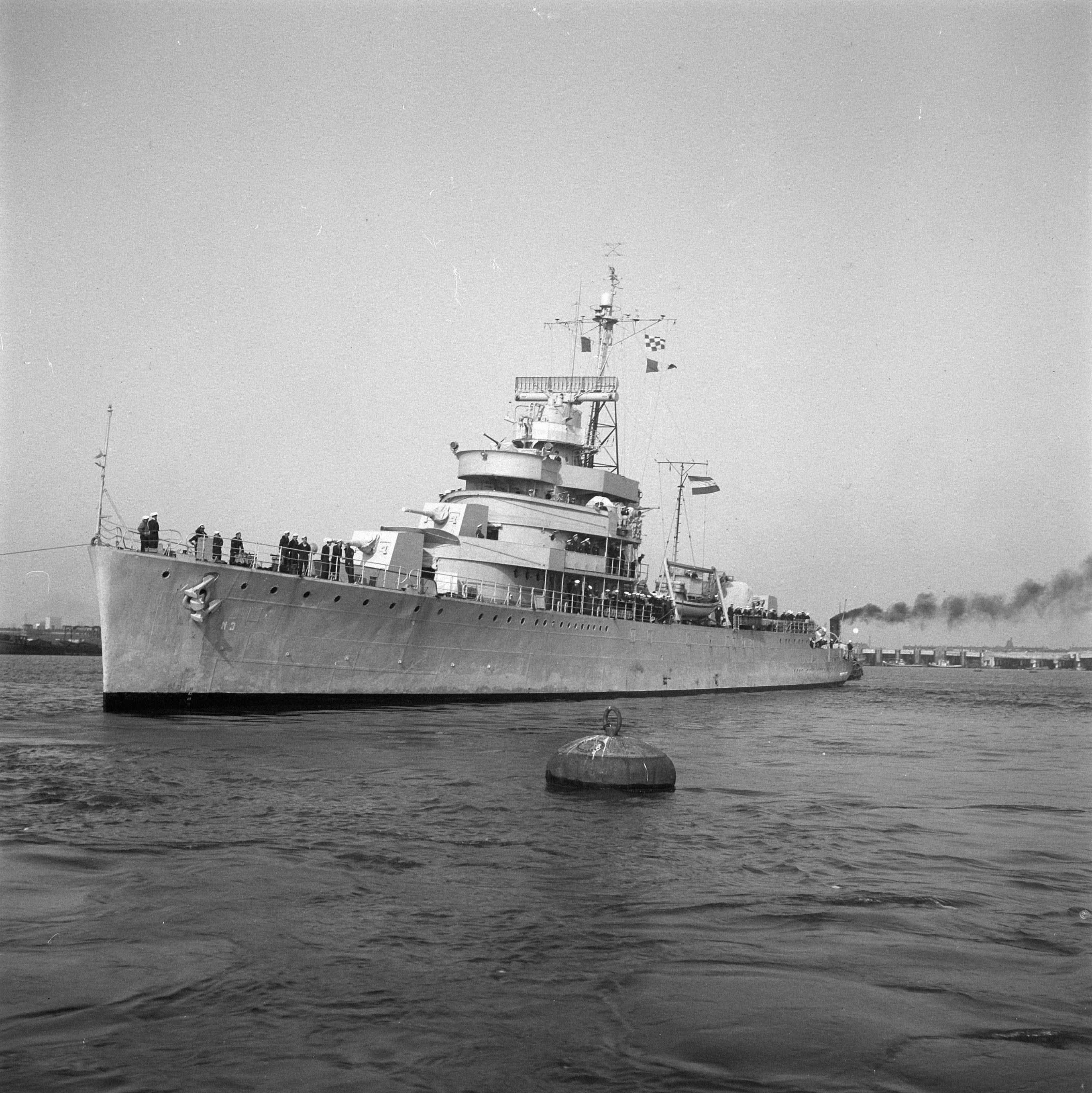 Collectie / Archief : Fotocollectie Anefo Reportage / Serie : [ onbekend ] Beschrijving : Aankomst "Van Kinsbergen" te Rotterdam Datum : 9 augustus 1948 Locatie : Rotterdam, Zuid-Holland Trefwoorden : AANKOMST Fotograaf : Merk, Ben / Anefo Auteursrechthebbende : Nationaal Archief Materiaalsoort : Negatief (zwart/wit) Nummer archiefinventaris : bekijk toegang 2.24.01.03 Bestanddeelnummer : 902-7914